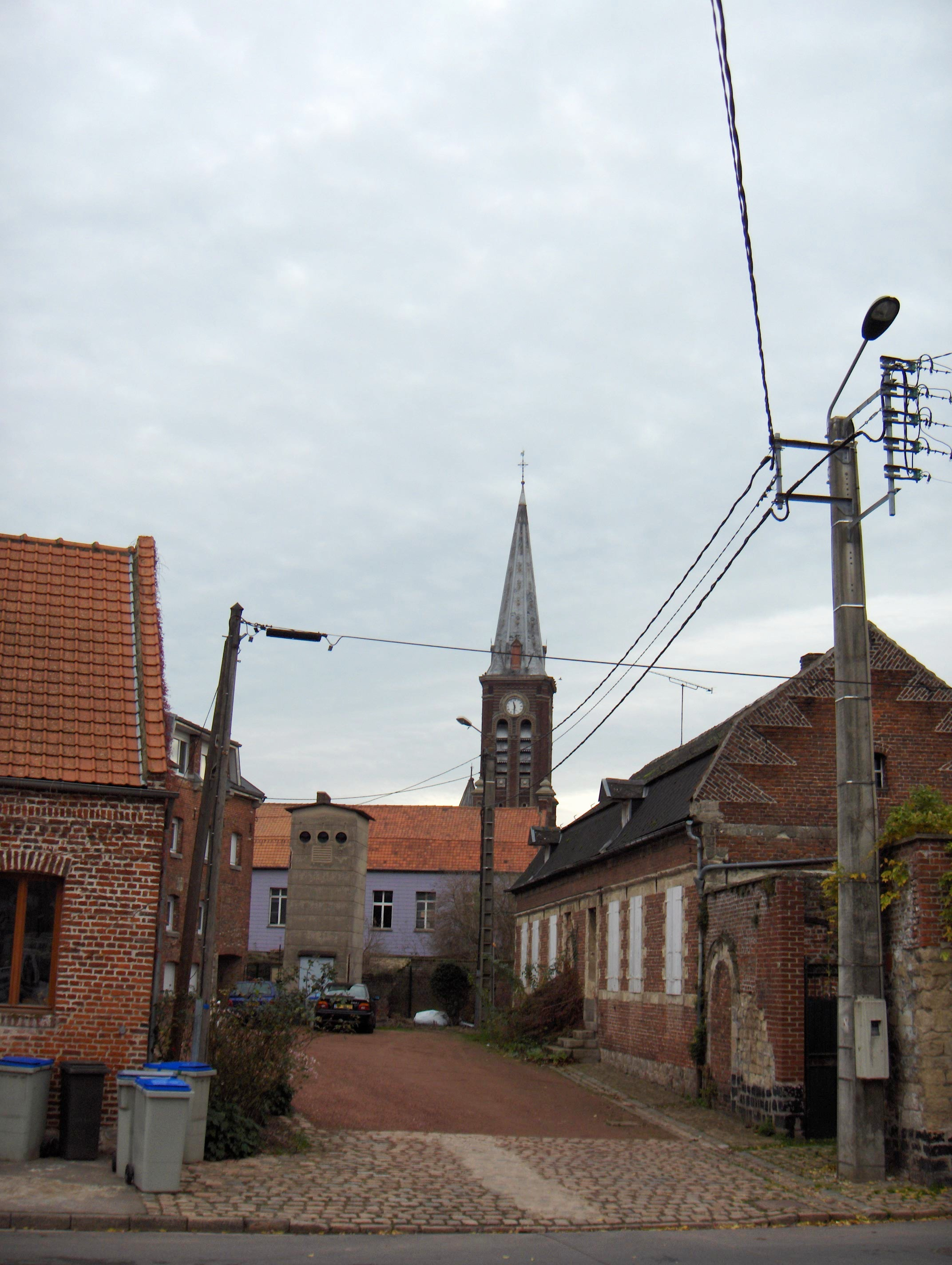 Haspres, Frankreich (Nord), Hof und Kirche